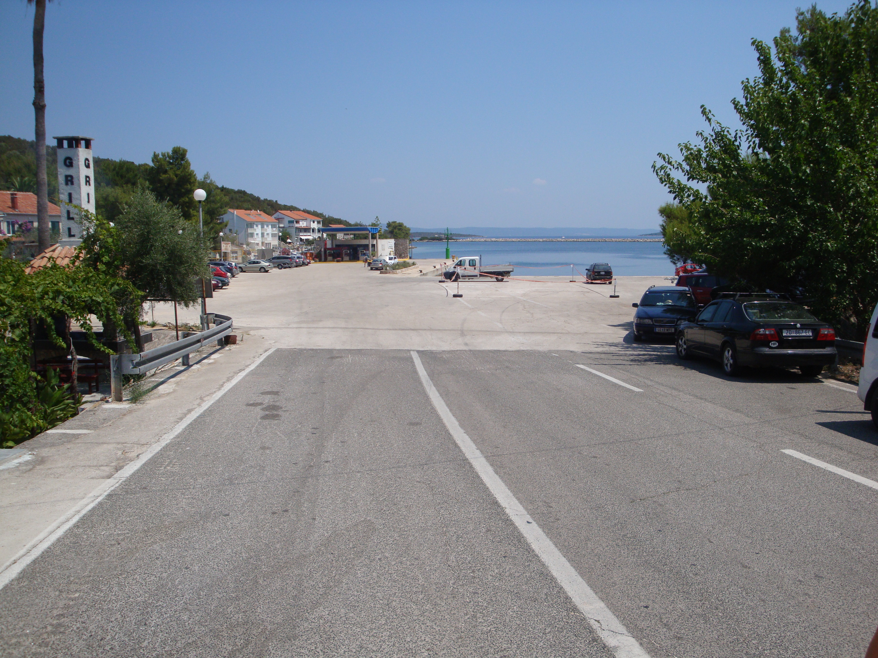 Zaglav, Dugi otok